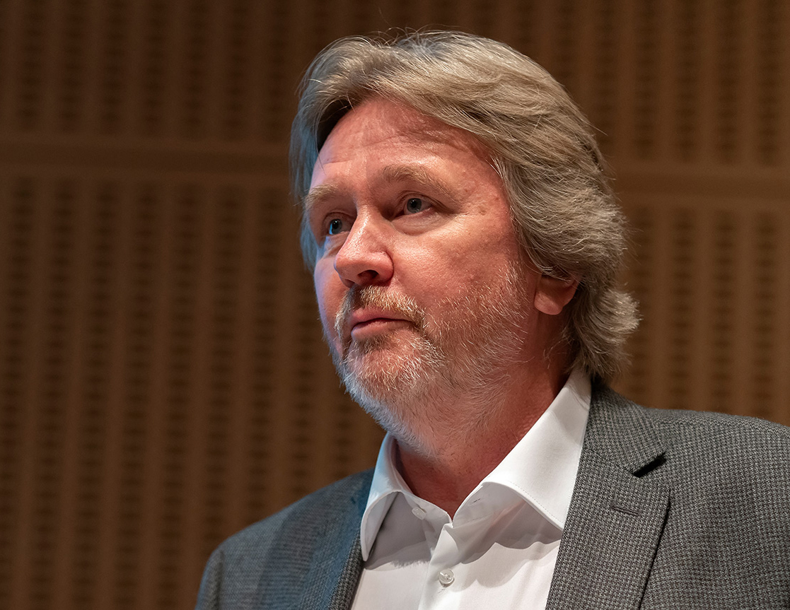 Toomas Siitan 2018